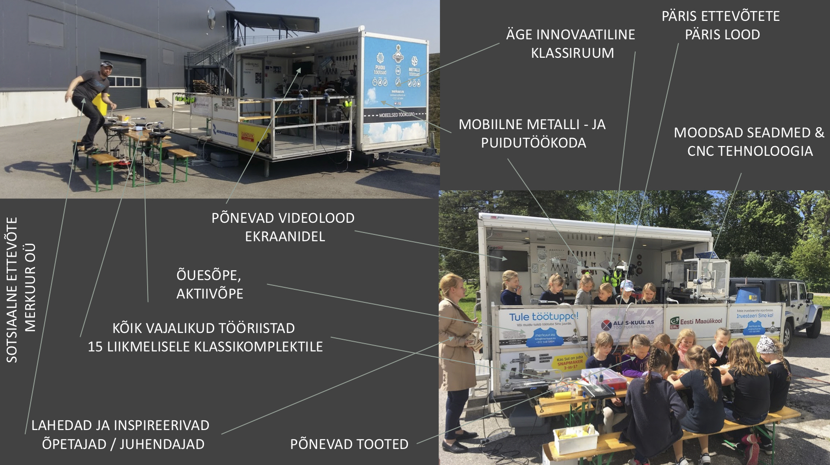 Mobiilsed töökojad koolides OÜ Merkuur